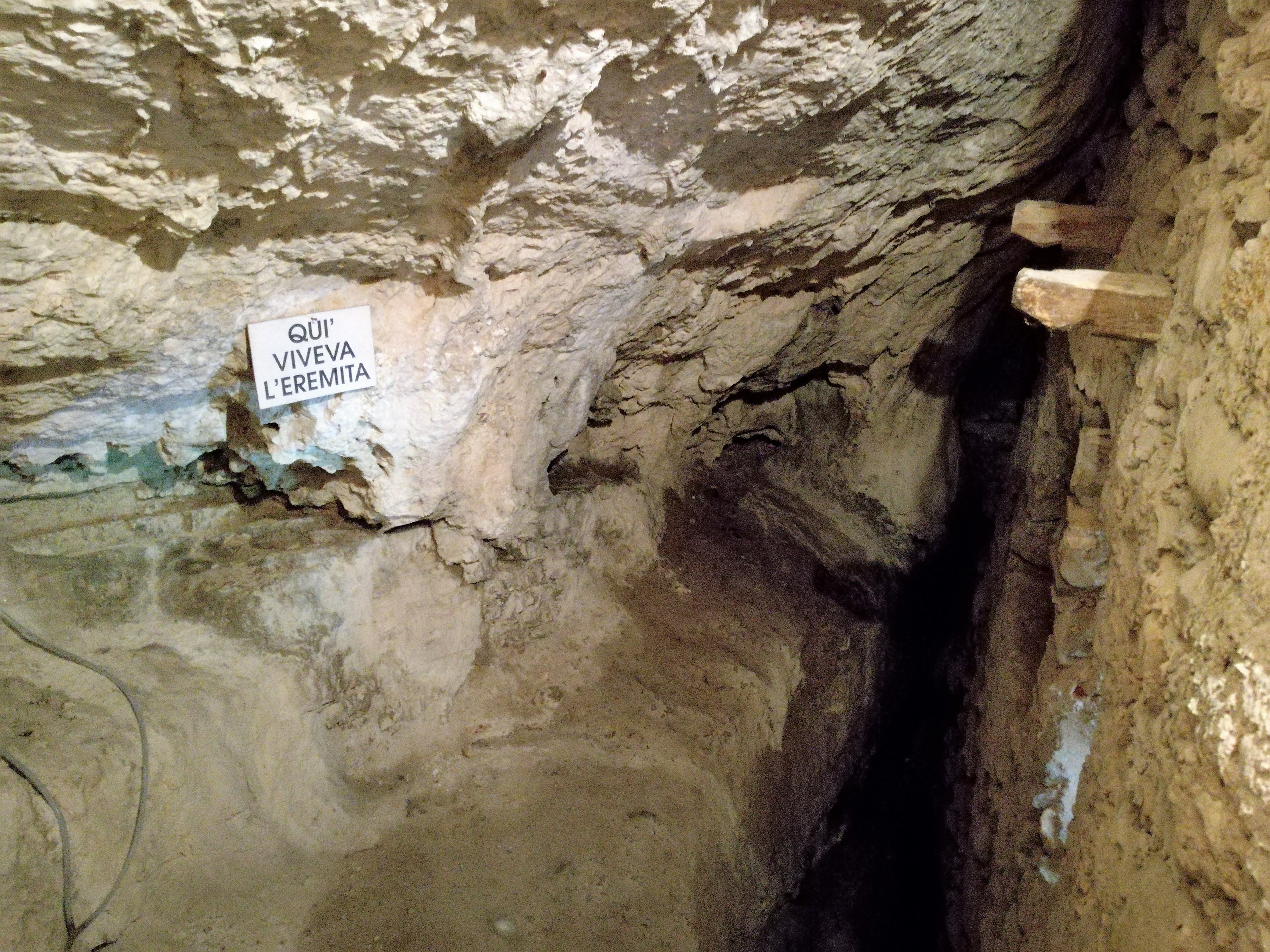 San Colombano - Höhle des Einsiedlers